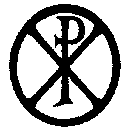 illustration de l'ouvrage "Le Martyr de Futuna" de Claude Nicolet